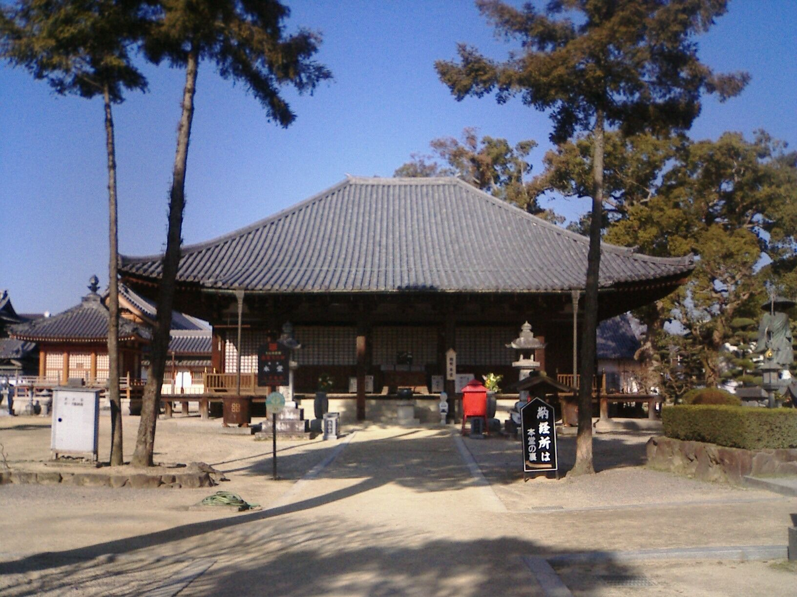 本山寺本堂 - 日本国香川県三豊市